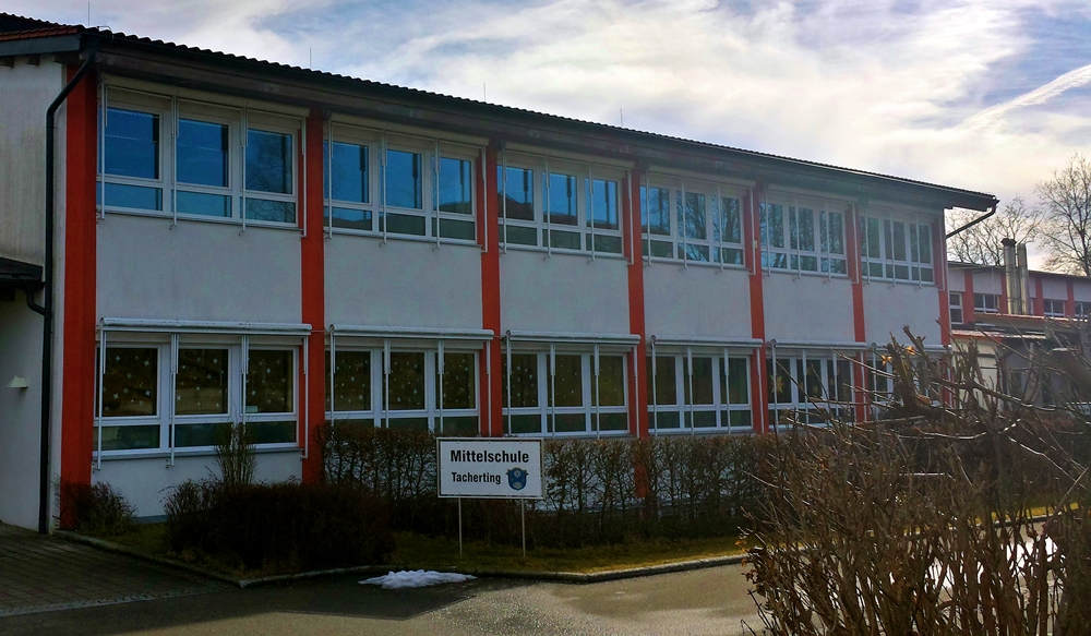 Mittelschule der Gemeinde Tacherting, Verbund in Mittelschule Alztal